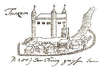 Tukumsi ordulinnus J. Helmsi joonistusel XVII sajandist. Kujutatud on nurgatornidega linnust ja asulat kirikuga.